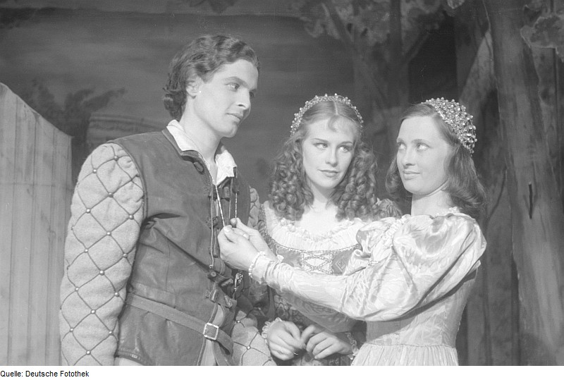 Original image description from the Deutsche Fotothek Szenenbilder